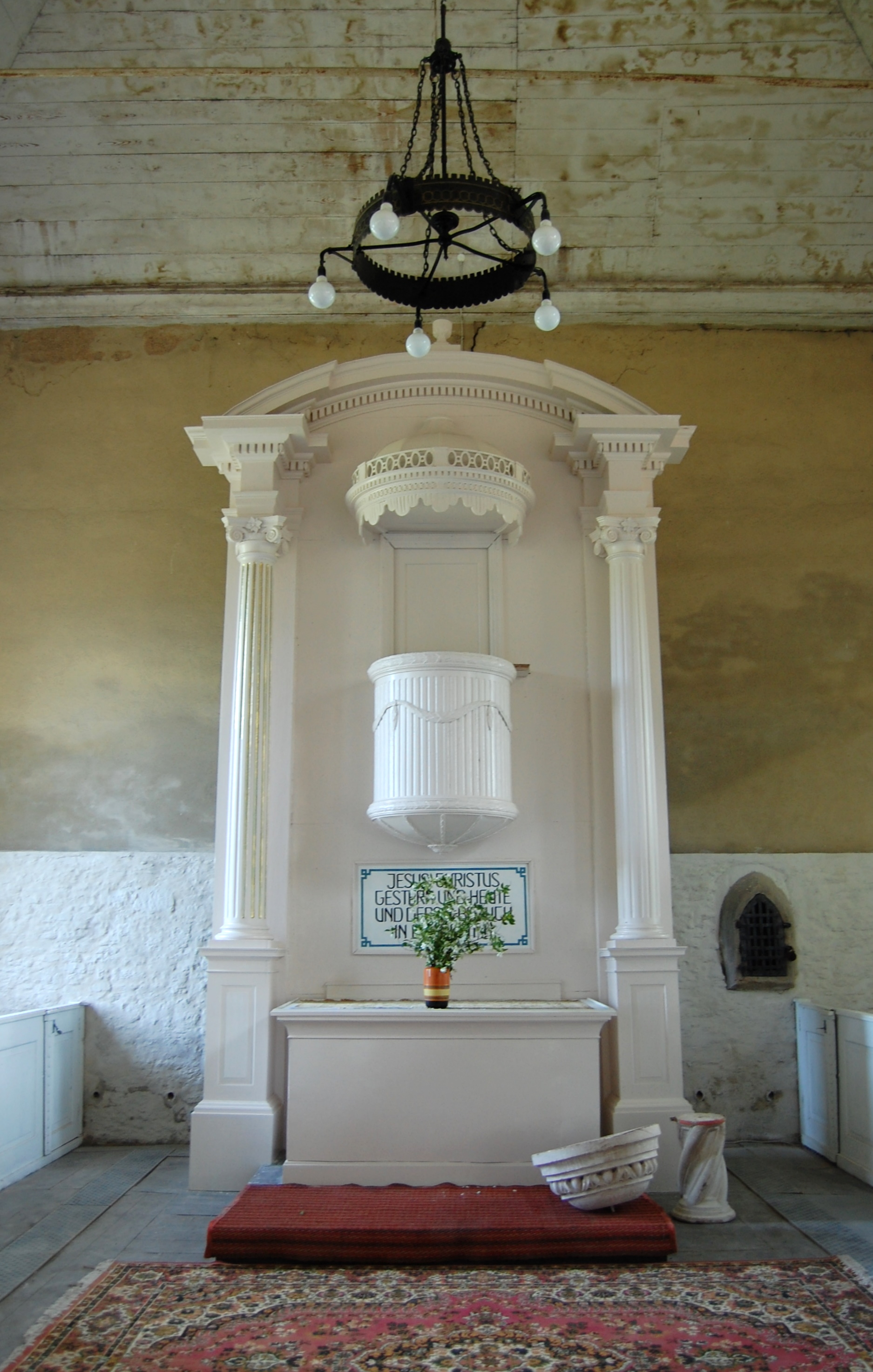 Kanzelaltar in der Sankt-Clemens-Kirche in Groß Börnecke